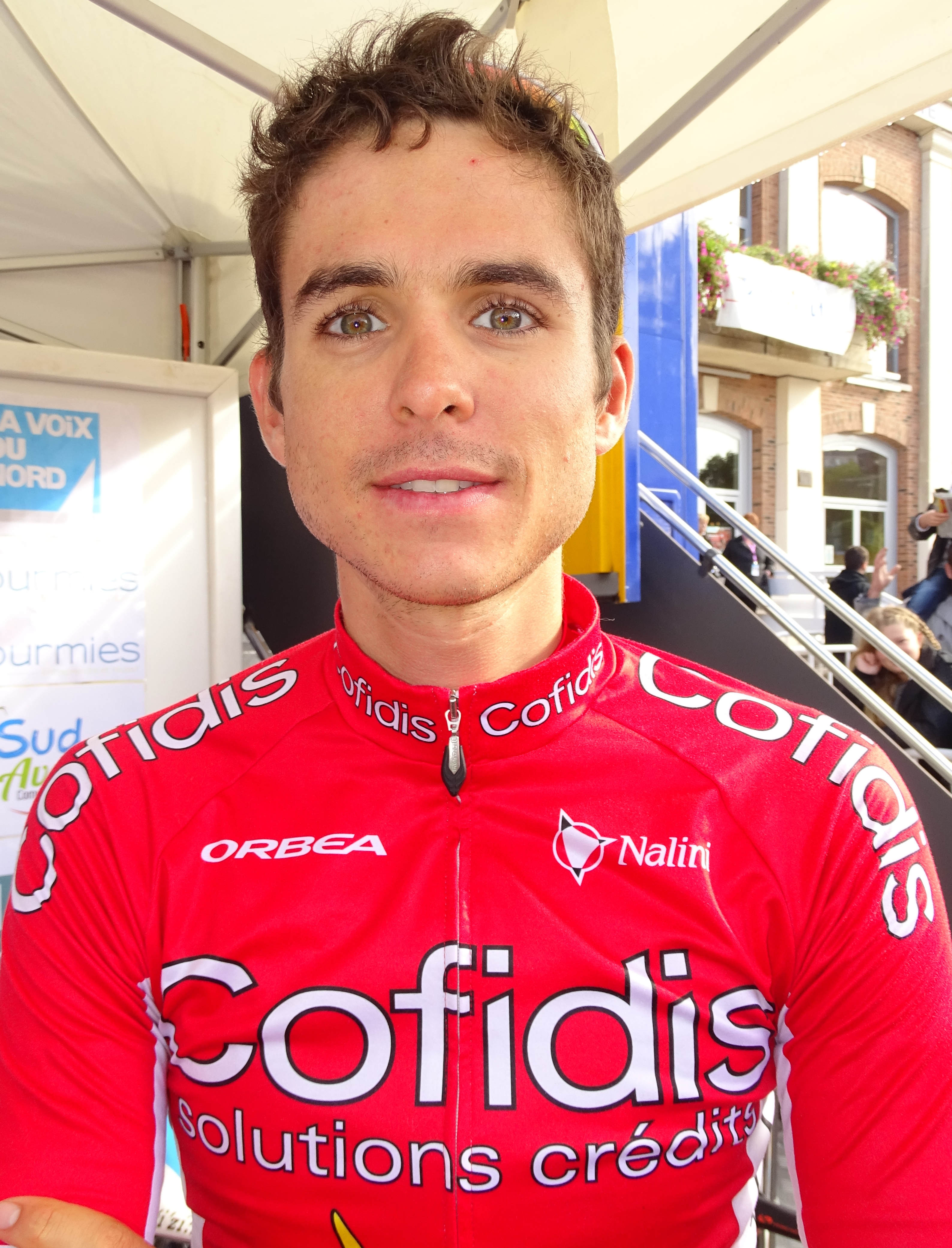 Reportage réalisé le dimanche 6 septembre à l'occasion du départ et de l'arrivée du Grand Prix de Fourmies 2015 à Fourmies, Nord-Pas-de-Calais, France.